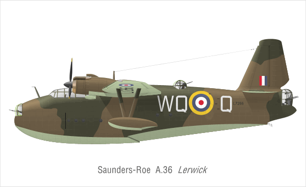 Saunders-Roe Lerwick